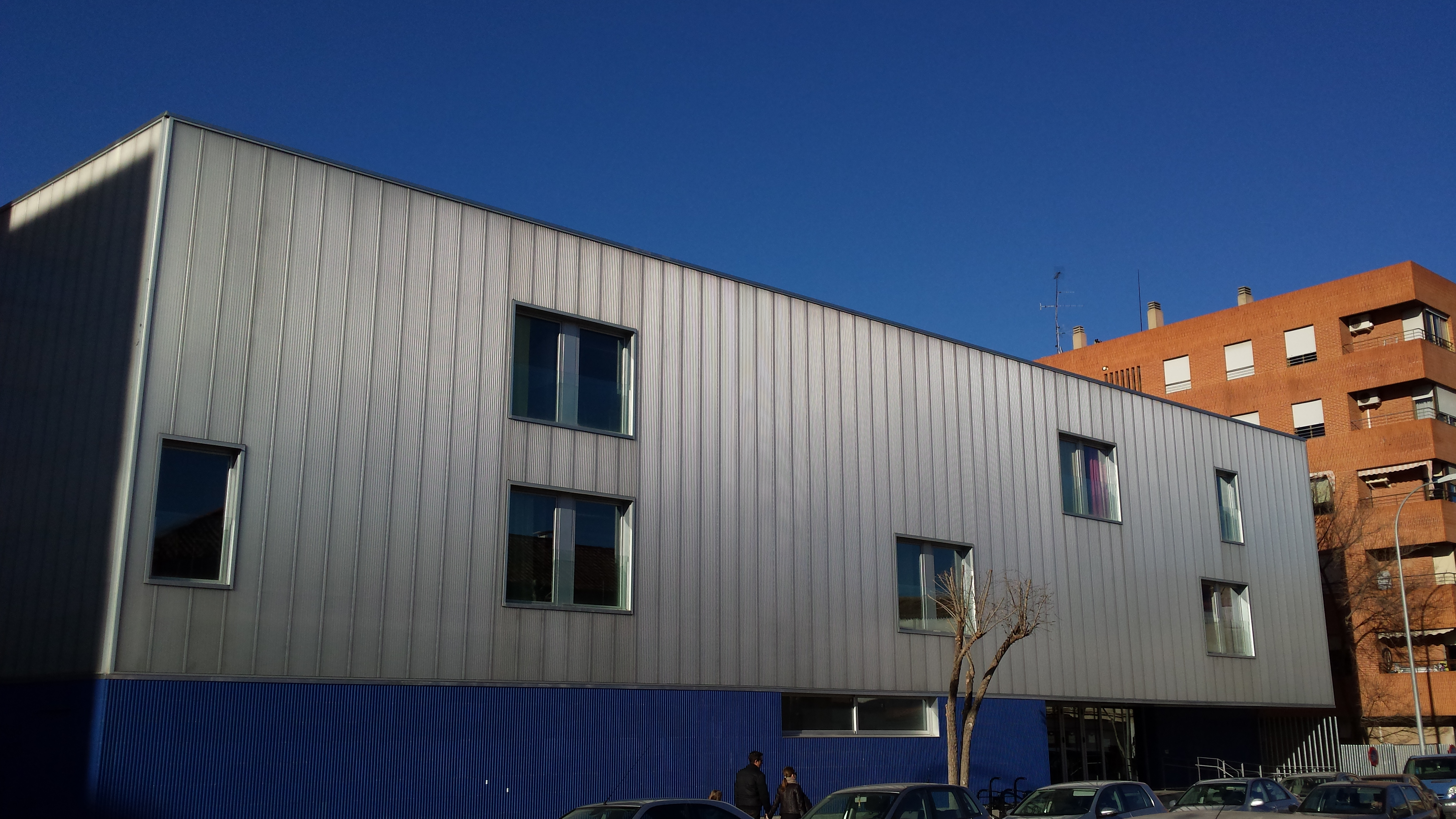 Moderno edificio del Centro de Educación de Personas Adultas de Albacete